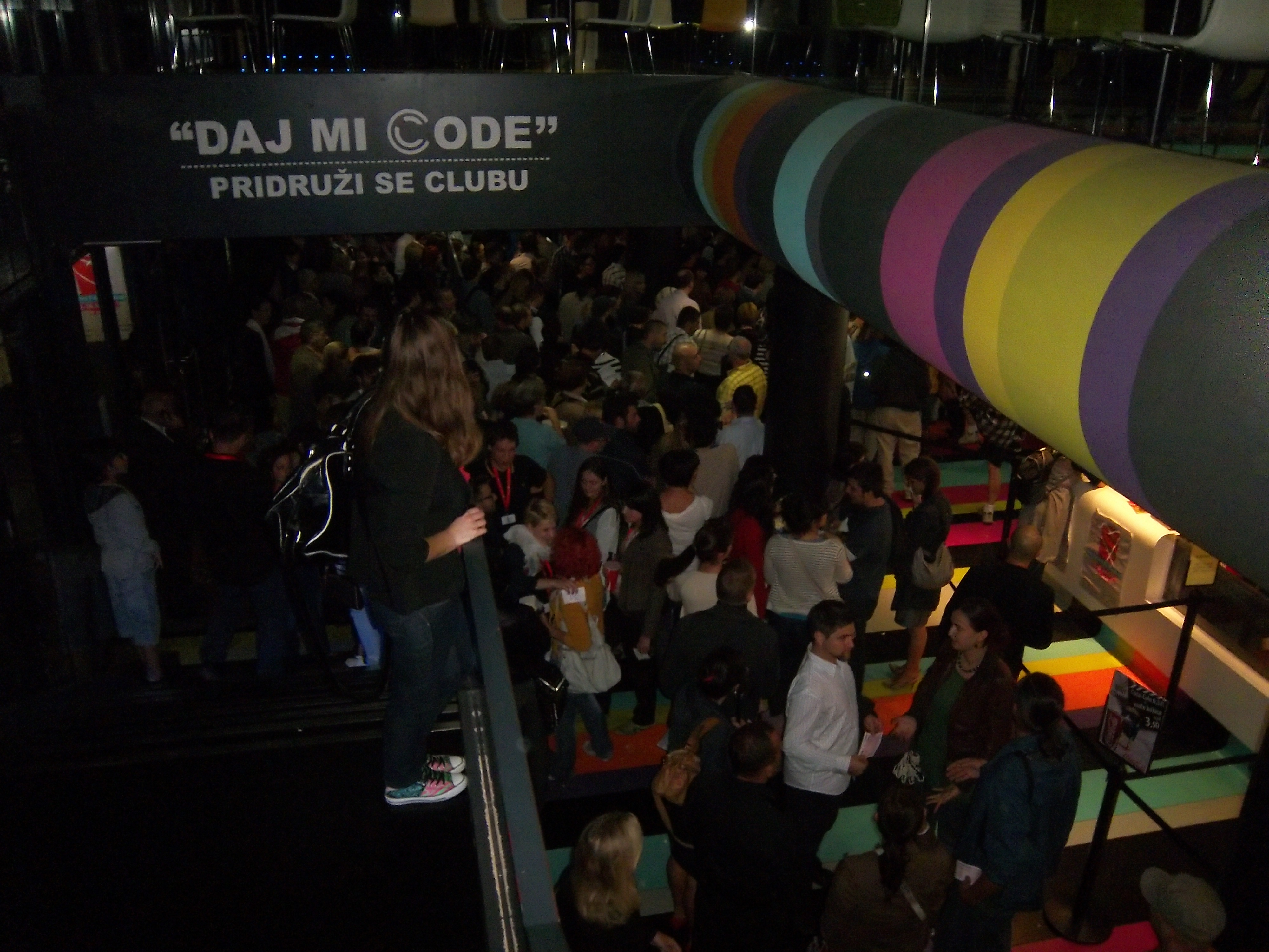 Документарни програм Сарајево филм фестивала 2011.-Dokumentarni program Sarajevo film festivala 2011.